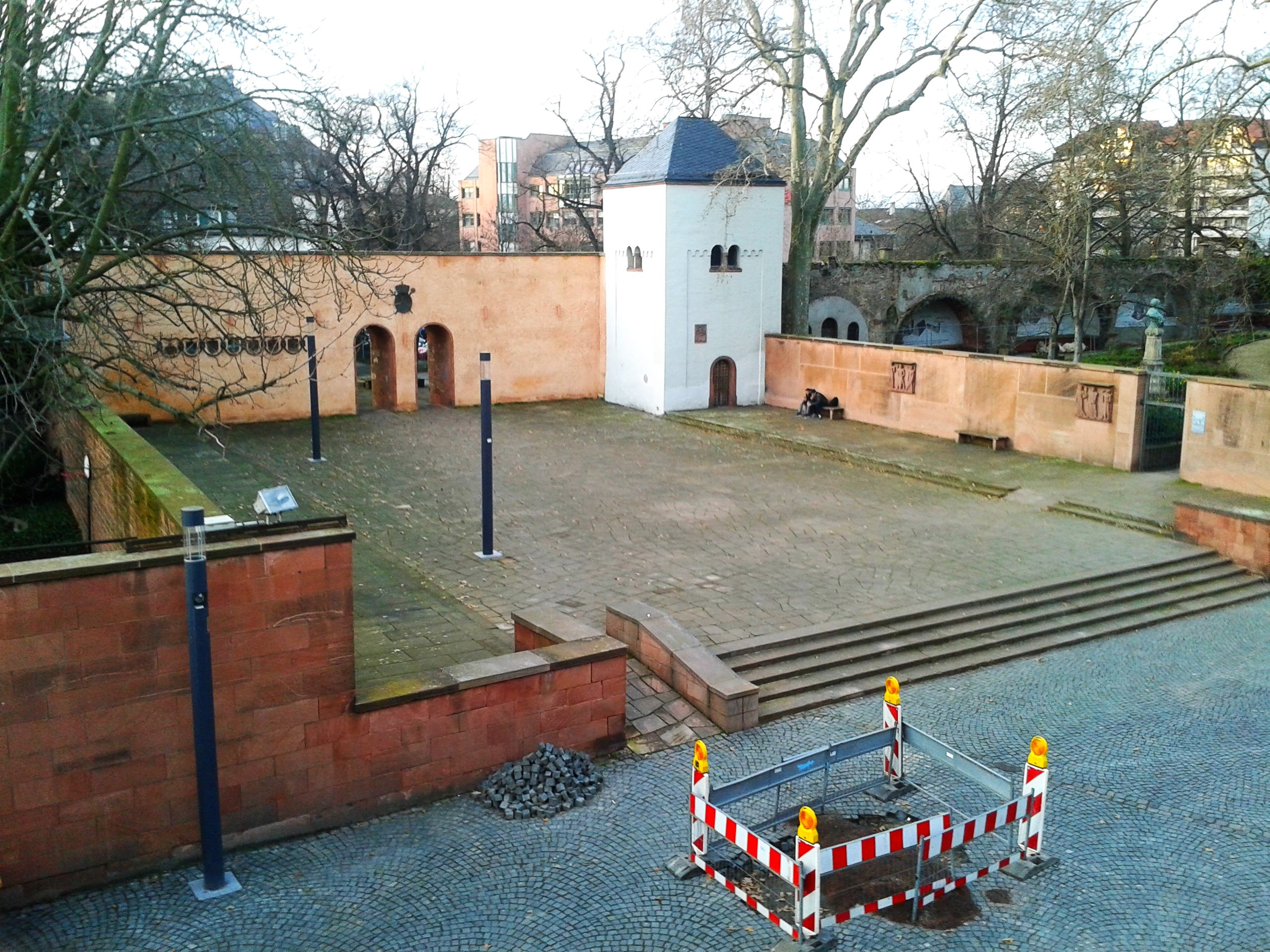 Platz der Partnerschaft - Vogelperspektive